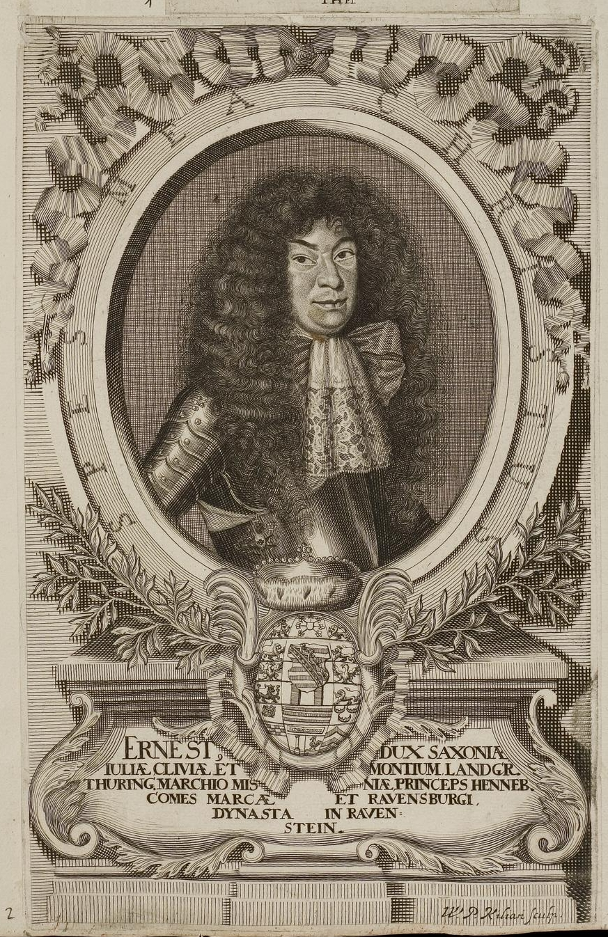 Grafik aus dem Klebeband Nr. 1 der Fürstlich Waldeckschen Hofbibliothek Arolsen Motiv: Herzog Ernst von Sachsen-Hildburghausen